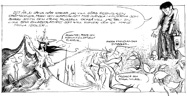 Nicolas Križan, del av serien "Vardagsrealism" tecknad 1982 för Seriefrämjandets medlemstidskrift ToTS 1/1983. Återtryckt 1985 i samlingshäftet Lillen igen (sid 5).